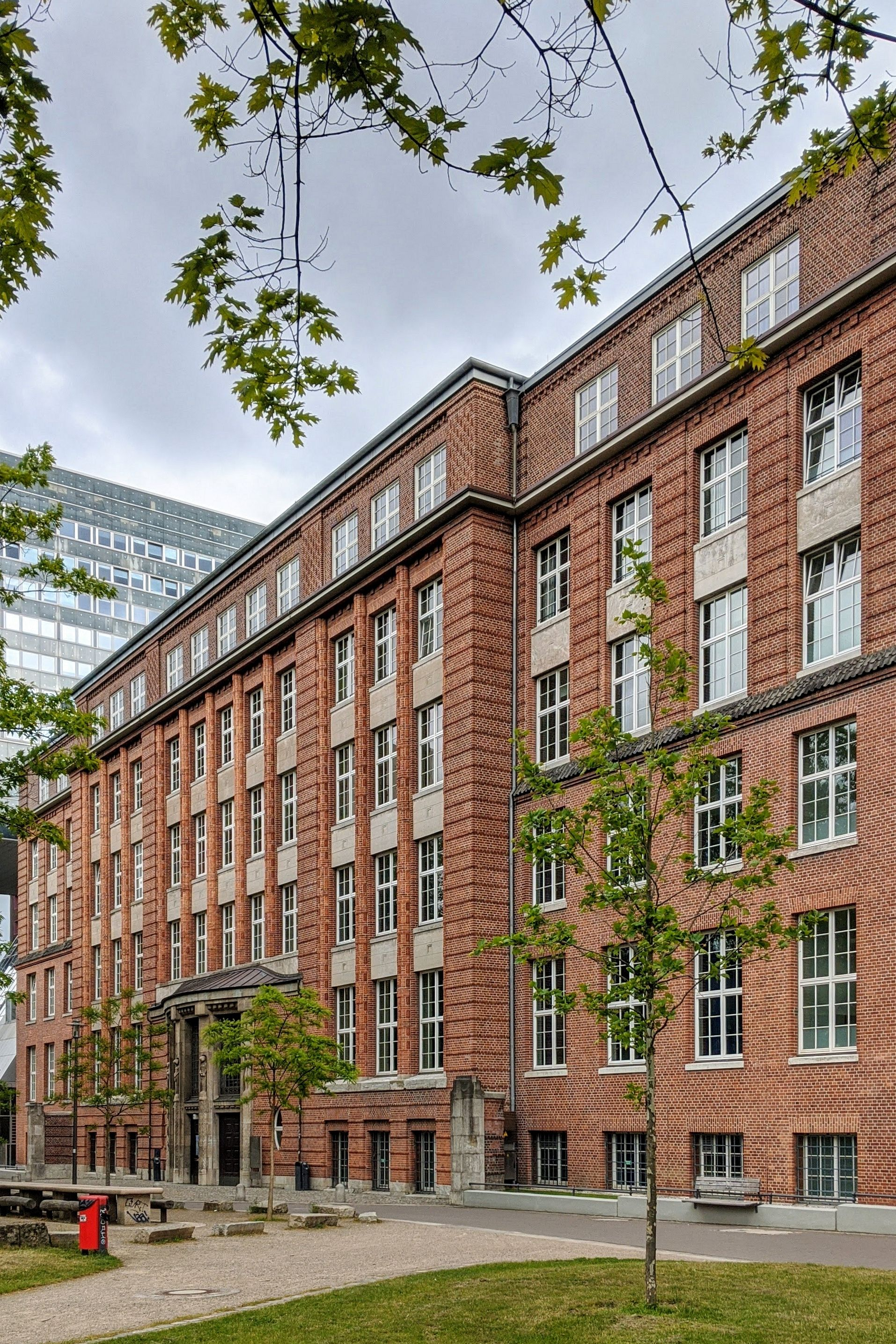 Hauptgebäude der HAW Hamburg, erbaut 1911-1914 von Fritz Schumacher